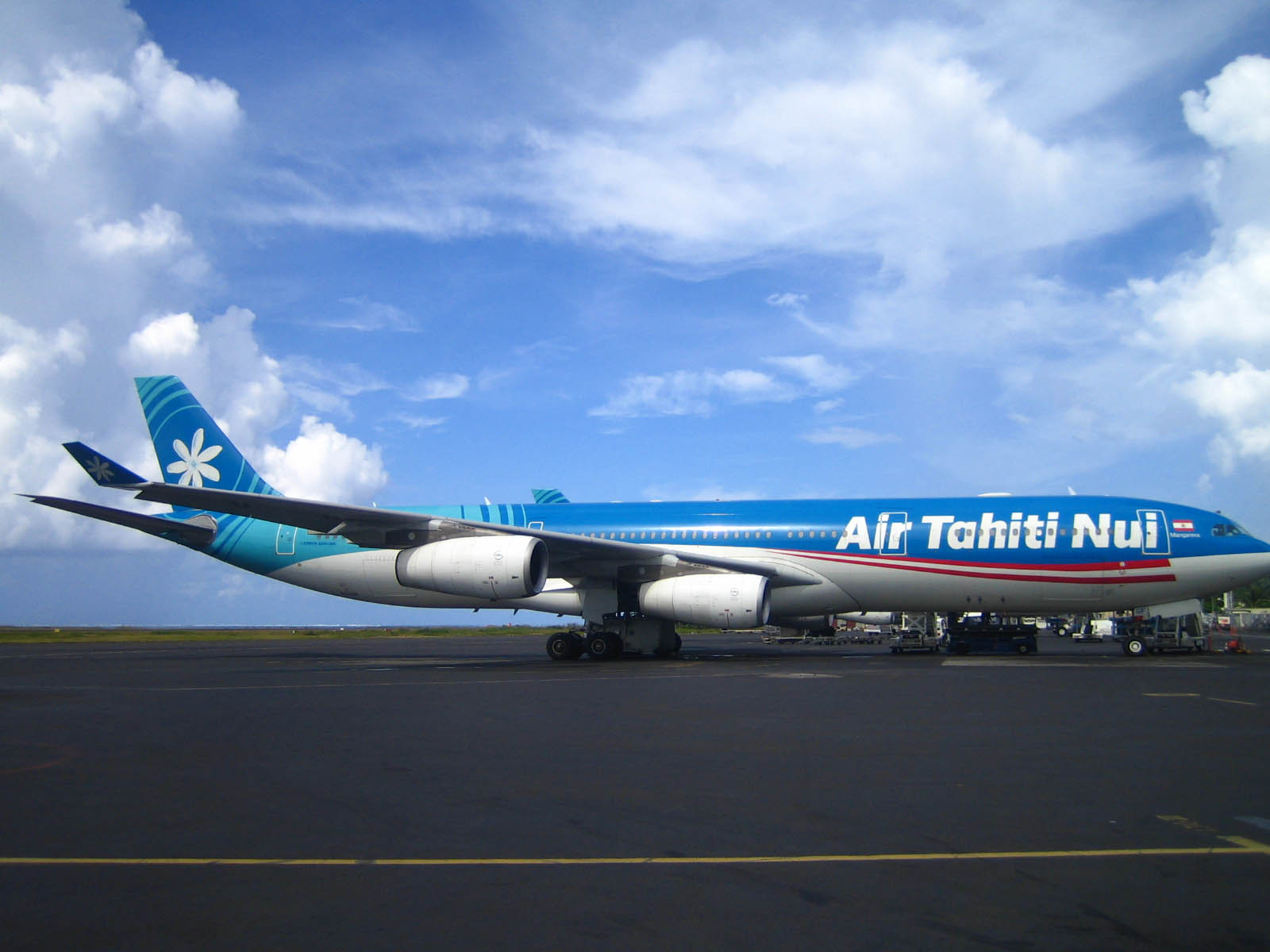 Photo Air Tahiti Nui à l'aérogare de Tahiti Faa'a (Photo personnel 2006) Utilisateur:FRED